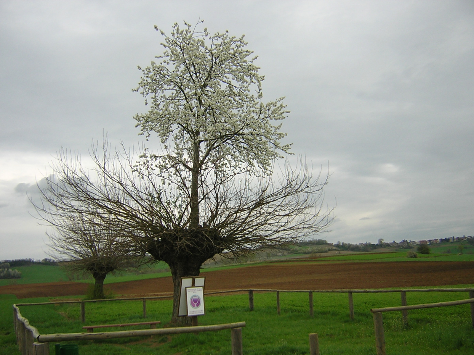 Il bi-albero di Casorzo (Asti, Italia)